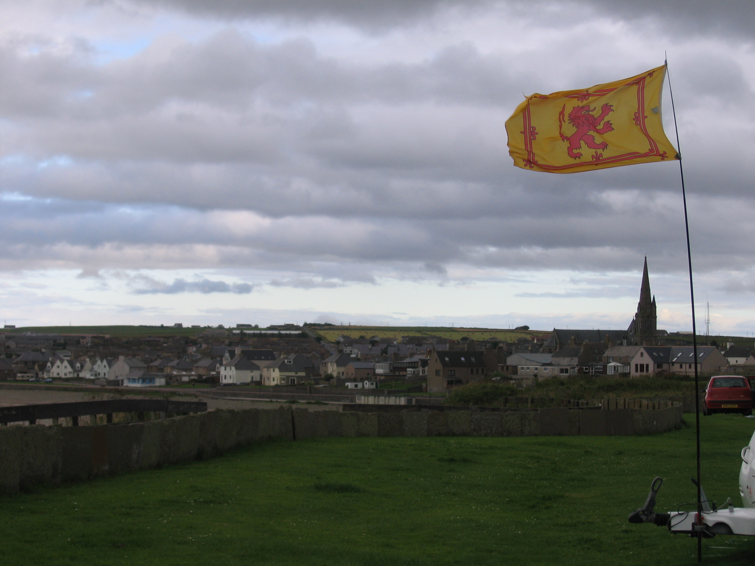 Thurso mit schottischer Flagge